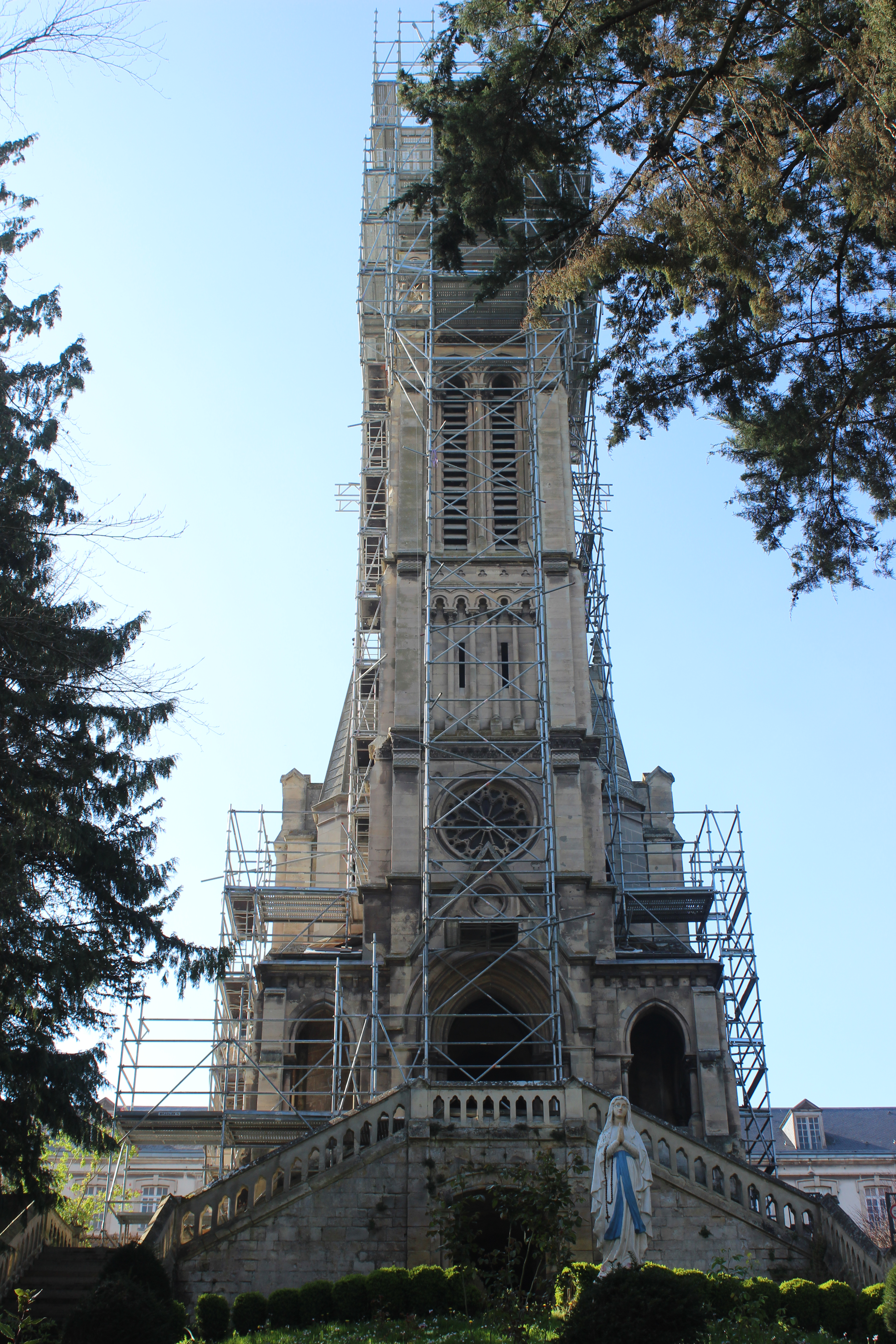 Petit Lourdes d'Herouville St Clair en travaux, avril 2017 (#100wikicommonsdays day 67)